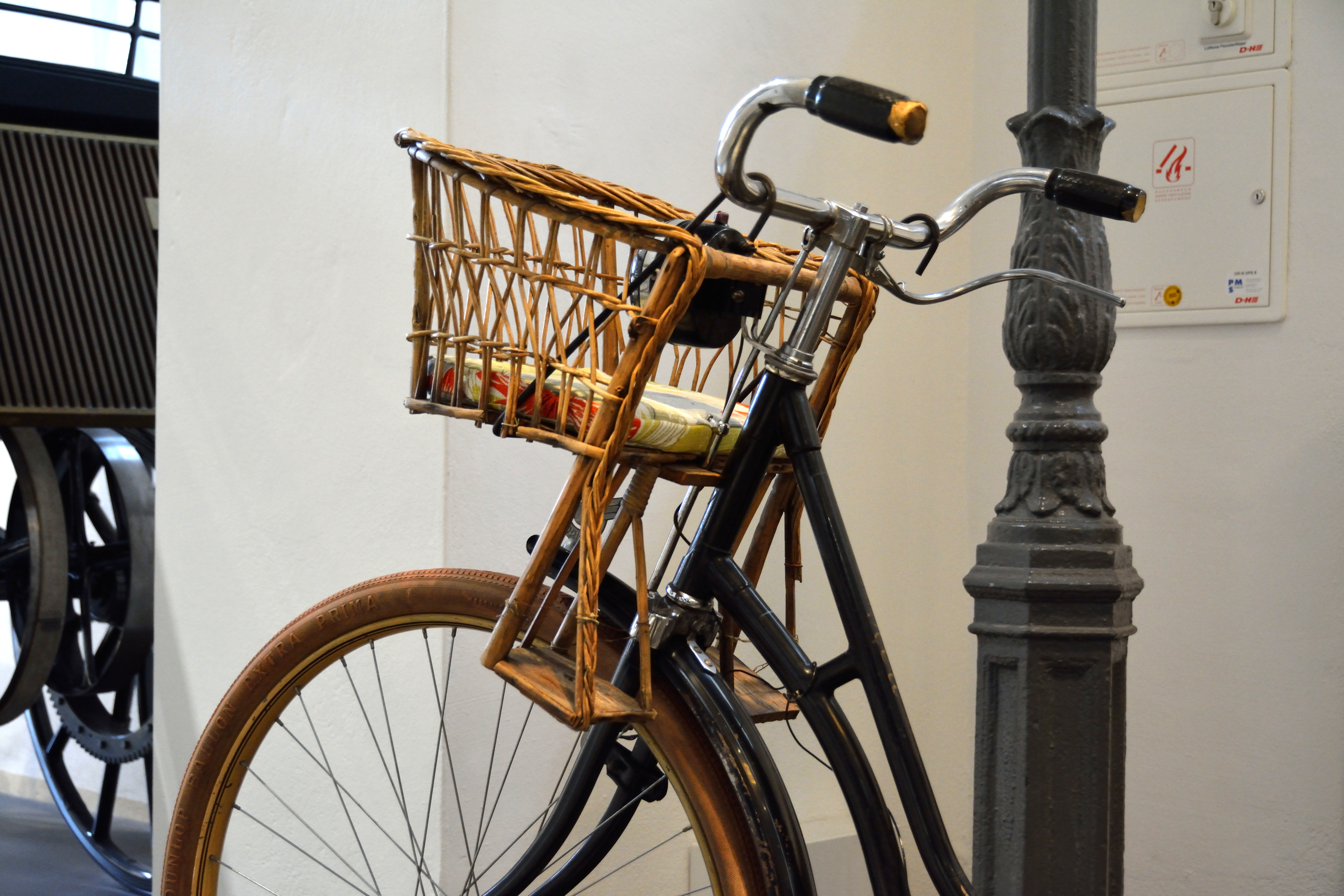 Ein Kindersitz an einem Fahrrad der Firma Göricke, um 1932. Ausstellungsstück im Verkehrsmuseum Dresden.